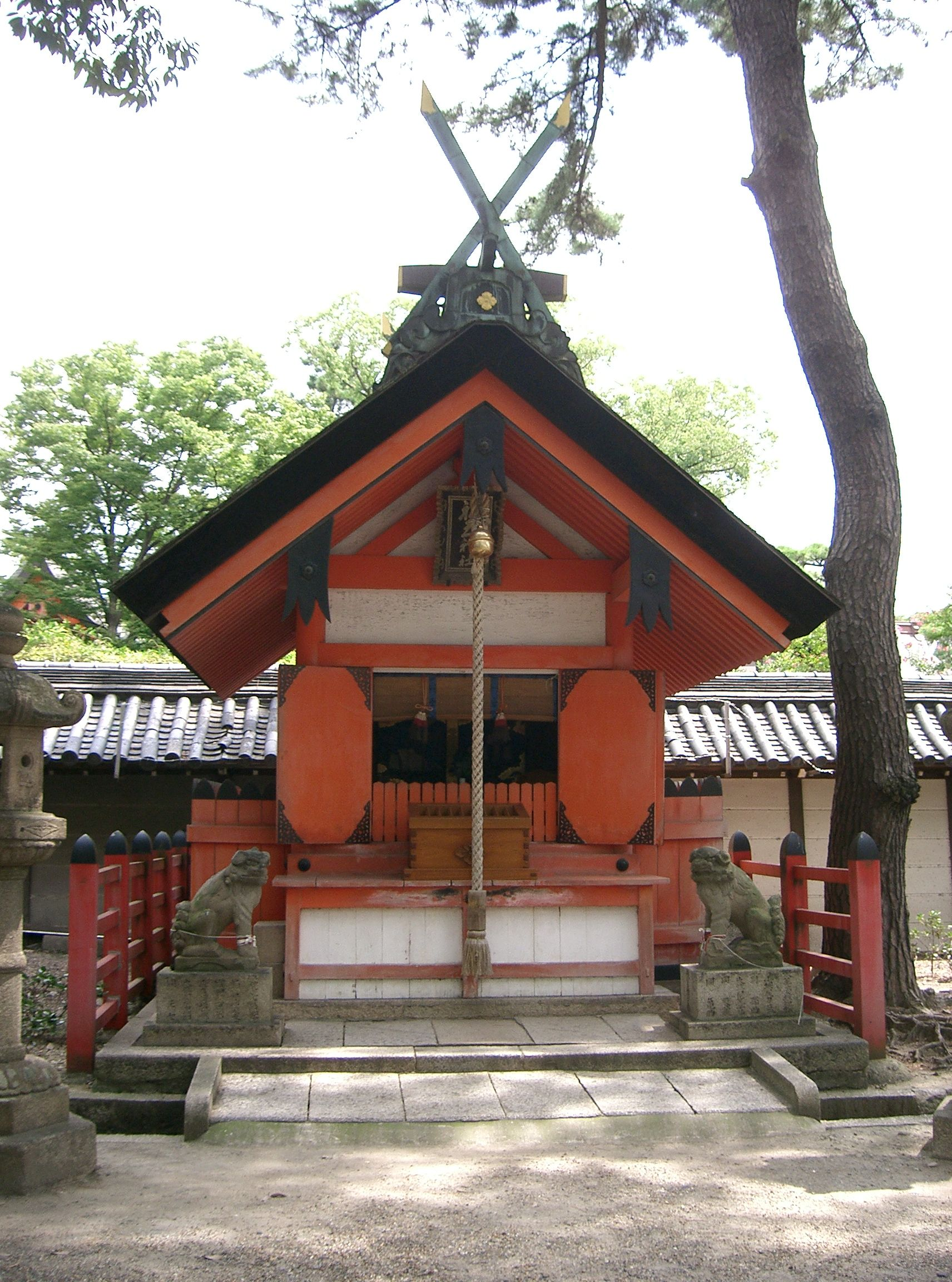 住吉大社 船玉神社